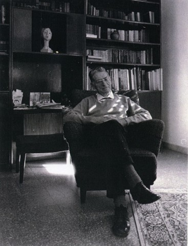 מרדכי סתר, ינואר 1977 (מס' קטלוגי: MUS 110 / L5)